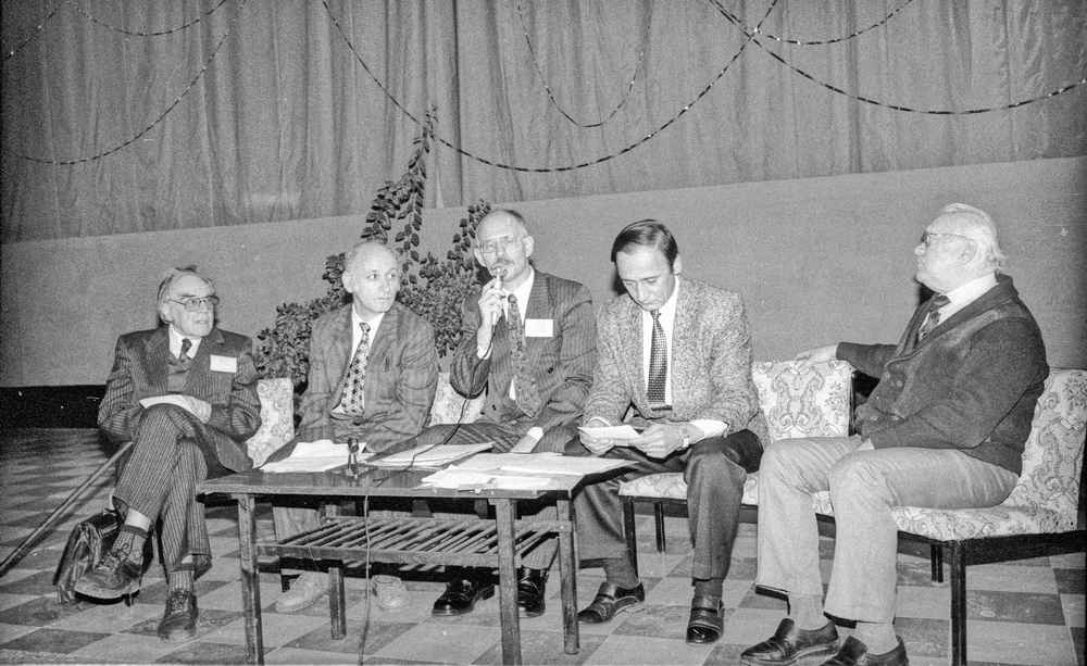 Президиум конференции «Малые города России». Переславль, улица Свободы, кинотеатр «Восток». Слева направо: Сигурд Оттович Шмидт (историк, академик Российской академии образования), Михаил Геннадьевич Дмитриев (профессор, ректор УГП), Александр Александрович Черёмин (историк), Евгений Алексеевич Мельник (мэр города Переславля-Залесского), Иван Борисович Пуришев (архитектор-реставратор, историк).